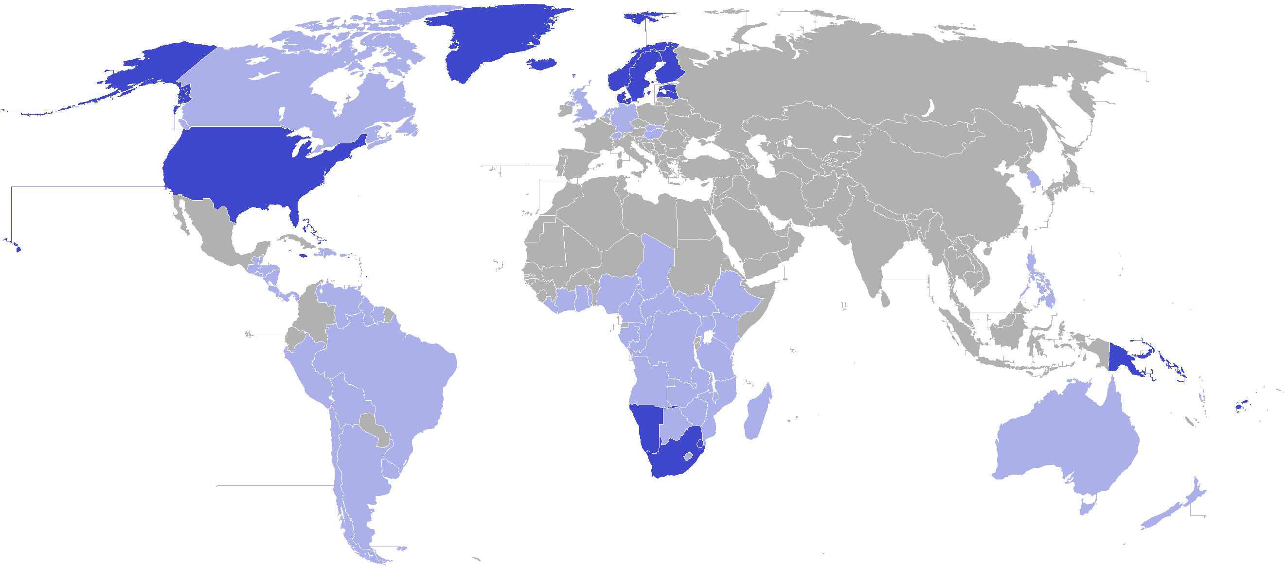 Países y regiones donde el protestantismo es el grupo religioso más grande Países y regiones donde el protestantismo es una gran minoría religiosa (más de 10%)